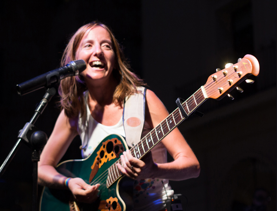 Inés Saavedra